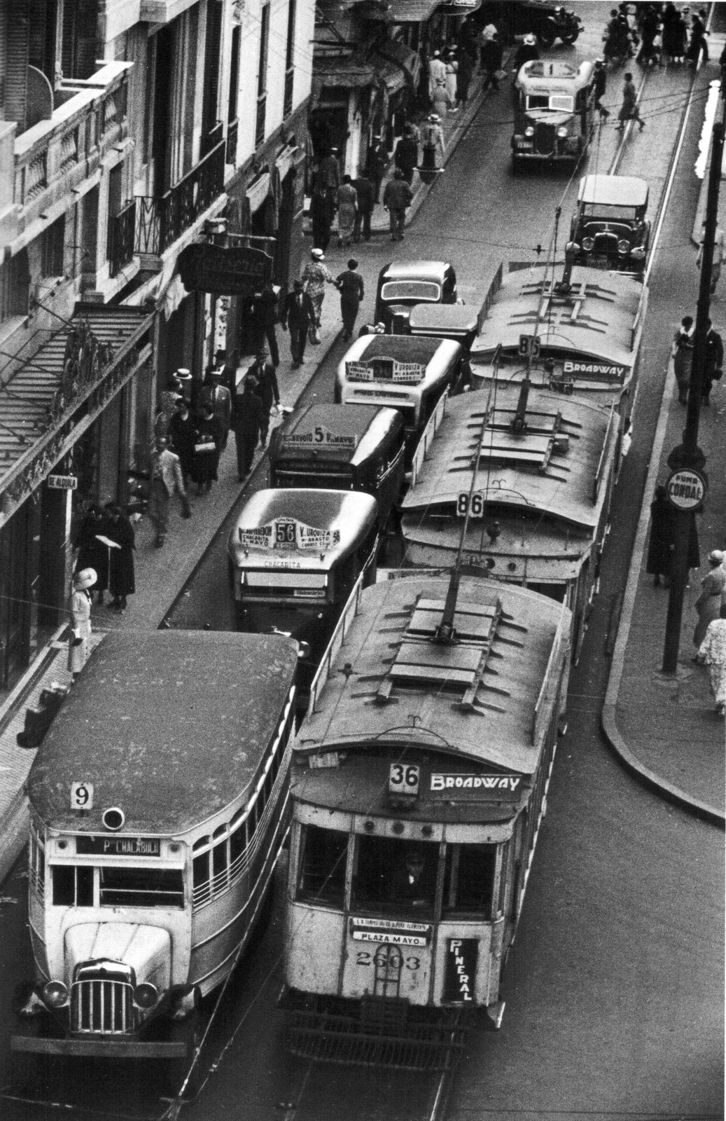 Tranvías en la intersección de Sarmiento y Diagonal Norte, Buenos Aires, en 1936.